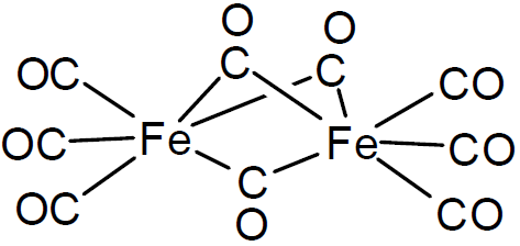 Tris(μ-carbonyl)hexacarbonyldieisen (Dieisennonacarbonyl)